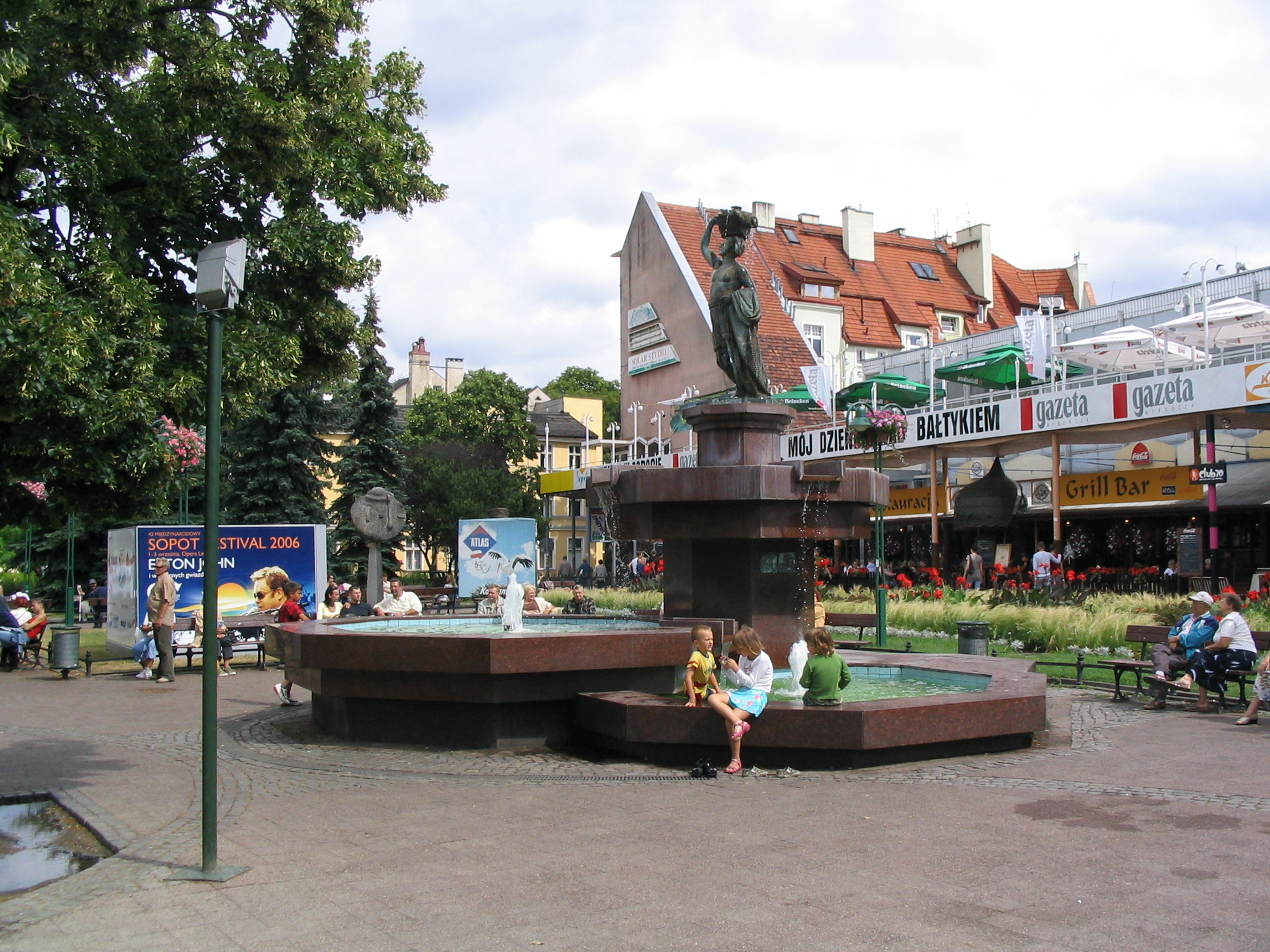 Fontanna w Sopocie, plac Przyjaciół Sopotu. Author: Goku122